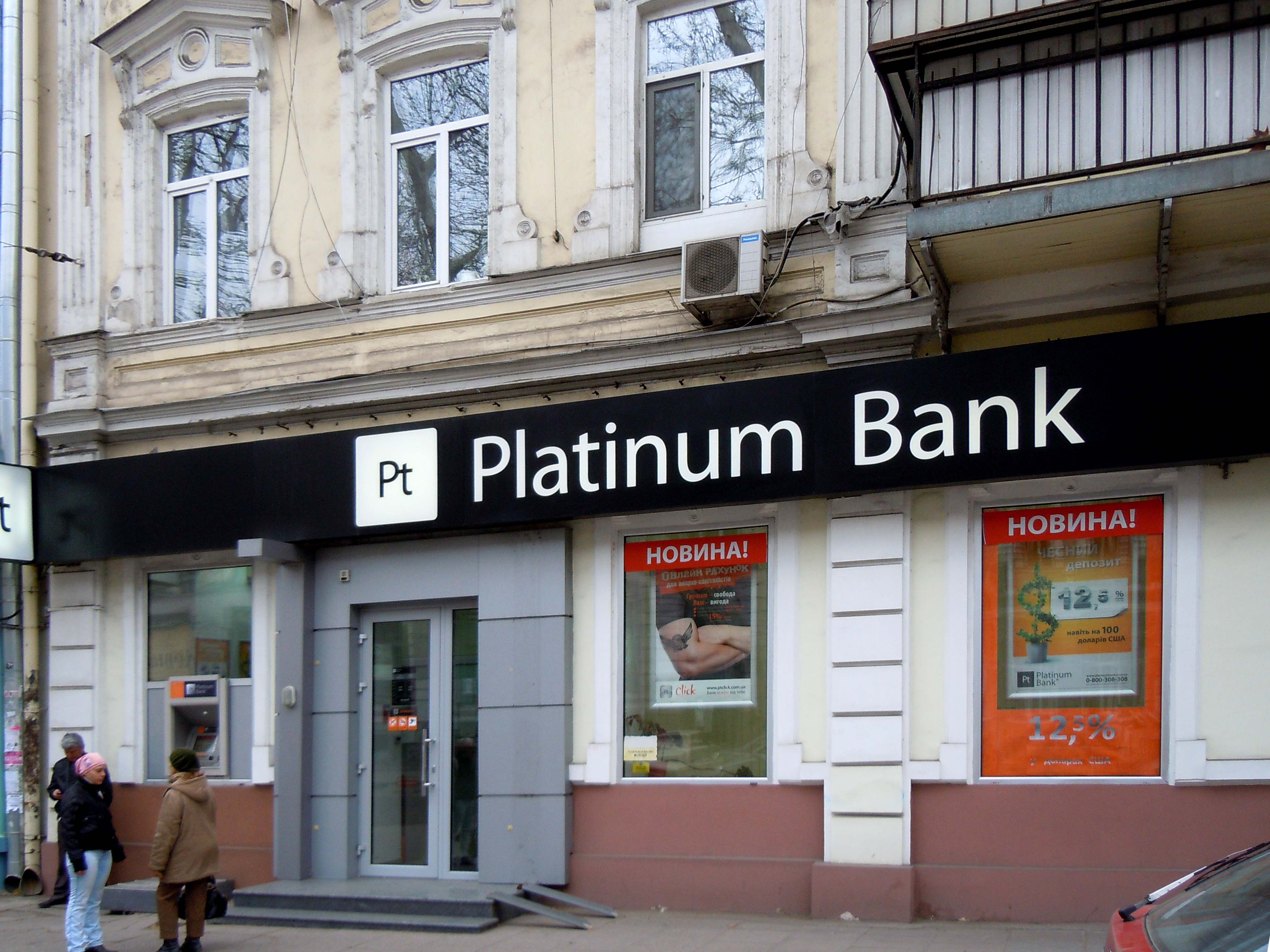 Офіс Банку "Платінум" в Одесі